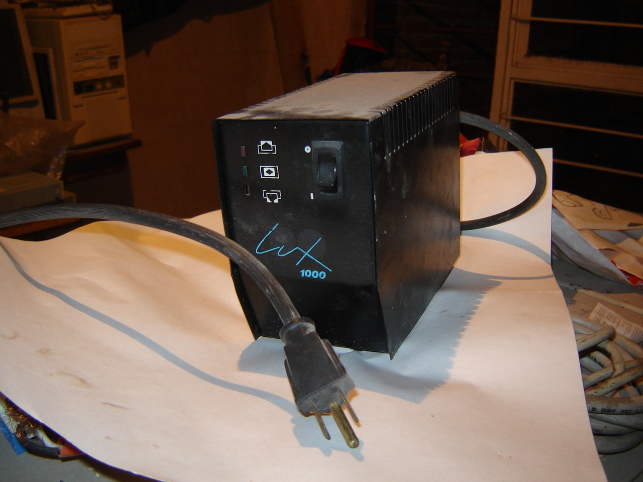 Este es un regulador utilizado para la suprecion de aumentos o disminucion de corriente, dando al ordenador un voltage sin altibajos.